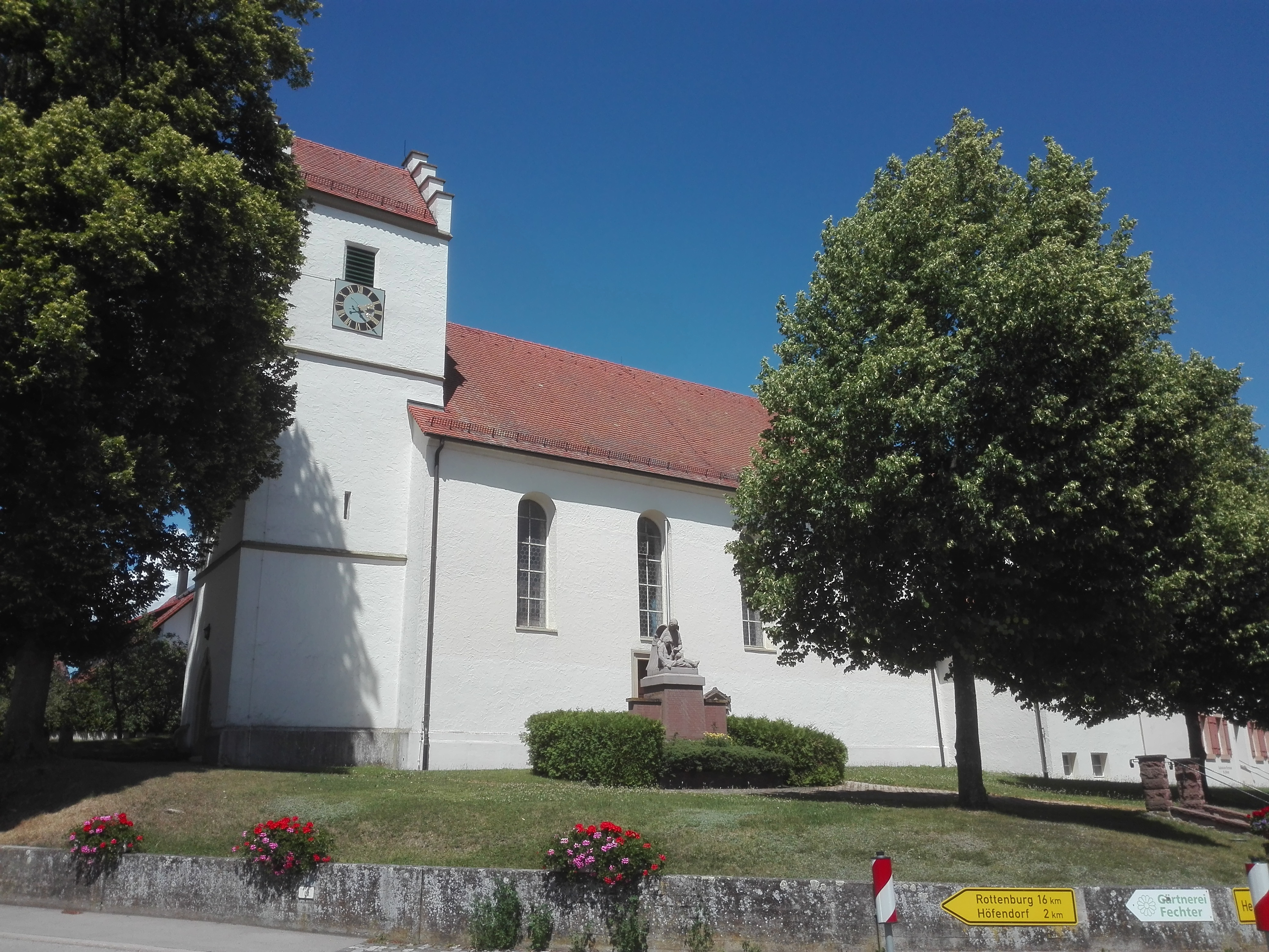 Kath. Kirche St. Johann Baptist in Haigerloch-Hart